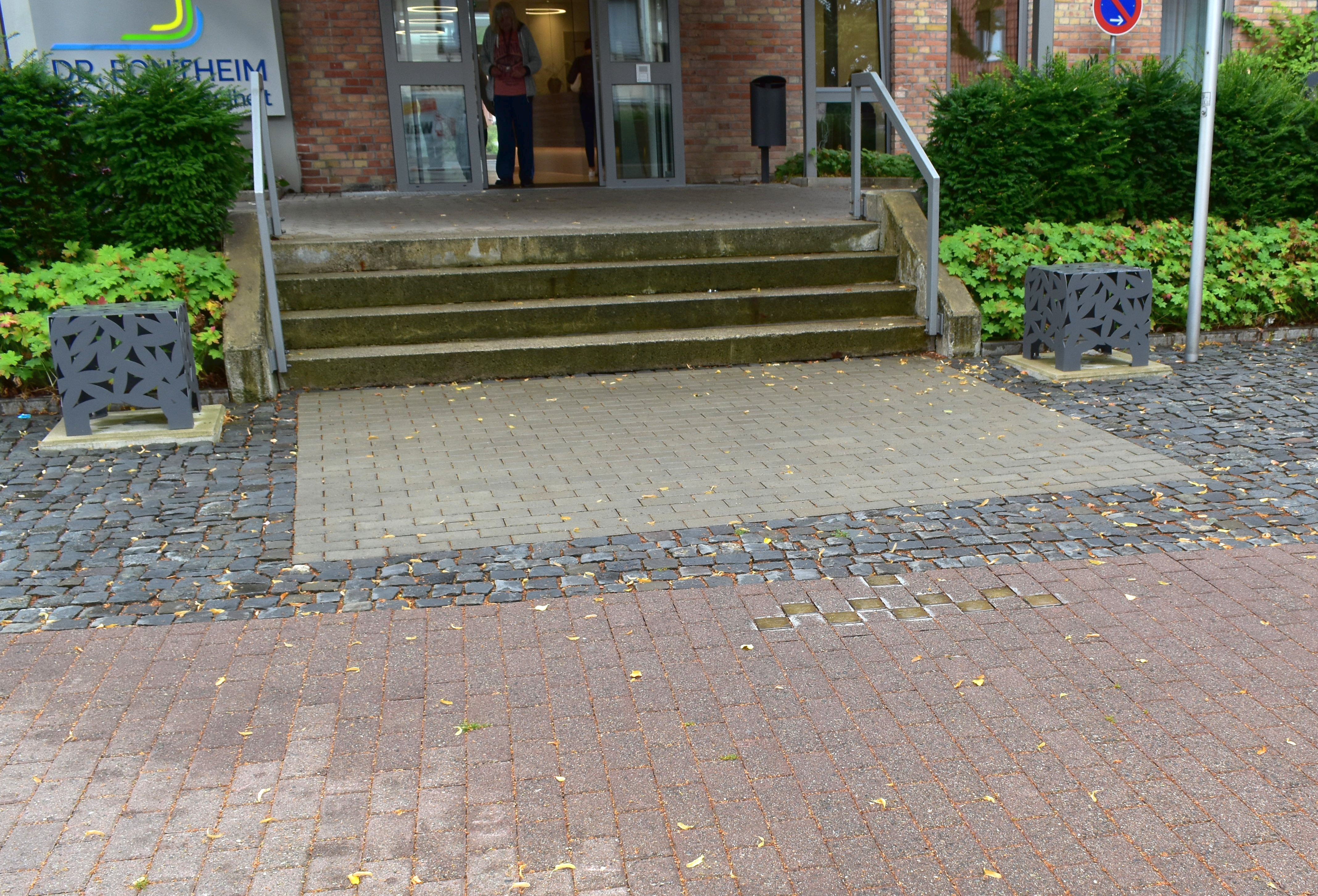 Lage der Stolpersteine für neun Frauen vor dem Eingang der Klinik Dr. Fontheim in Liebenburg